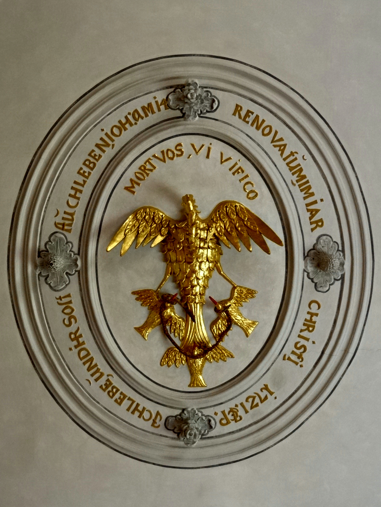 Evangelische Kirche (Ulfa)